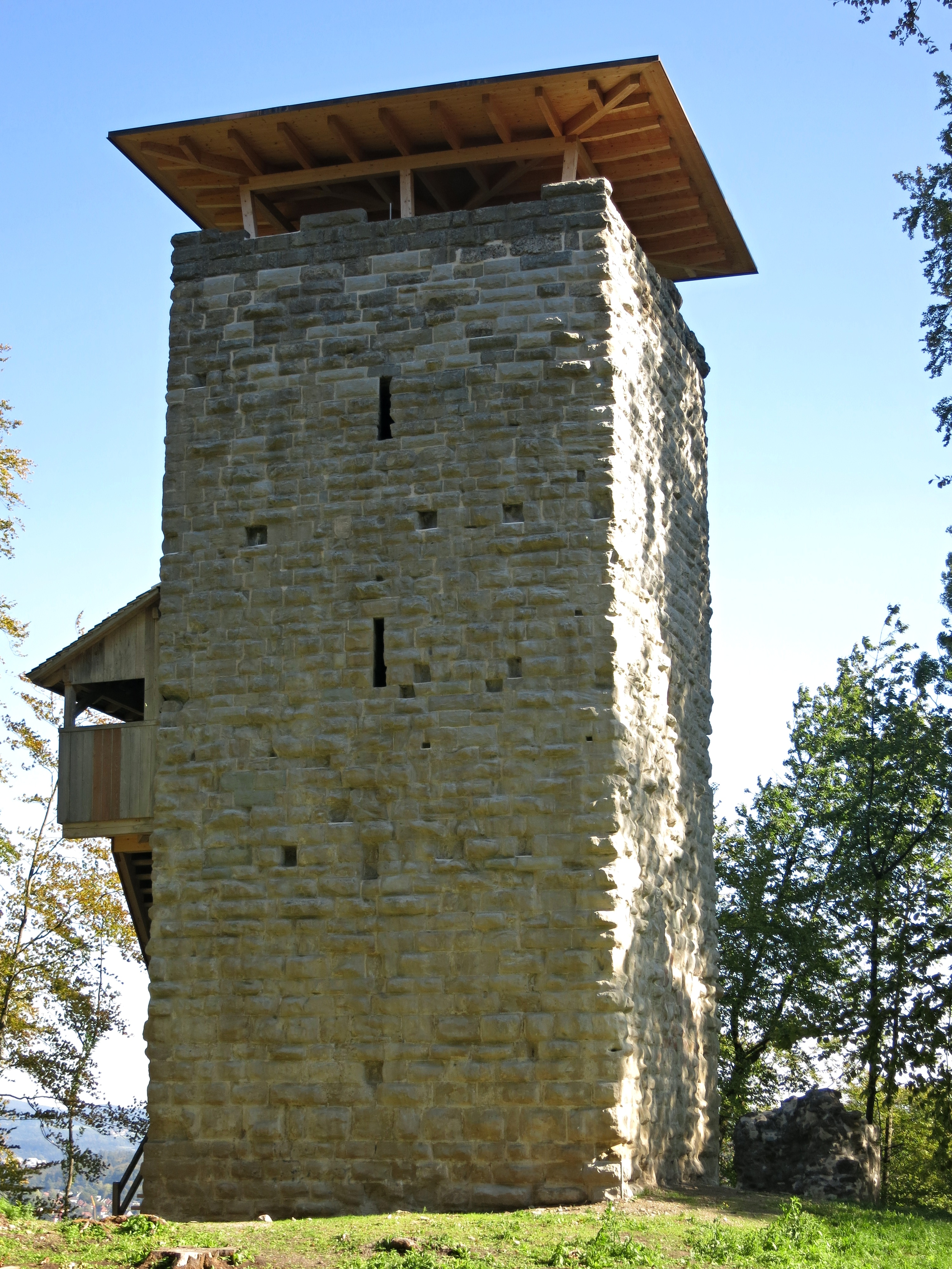 Burgruine Alt-Wülflingen